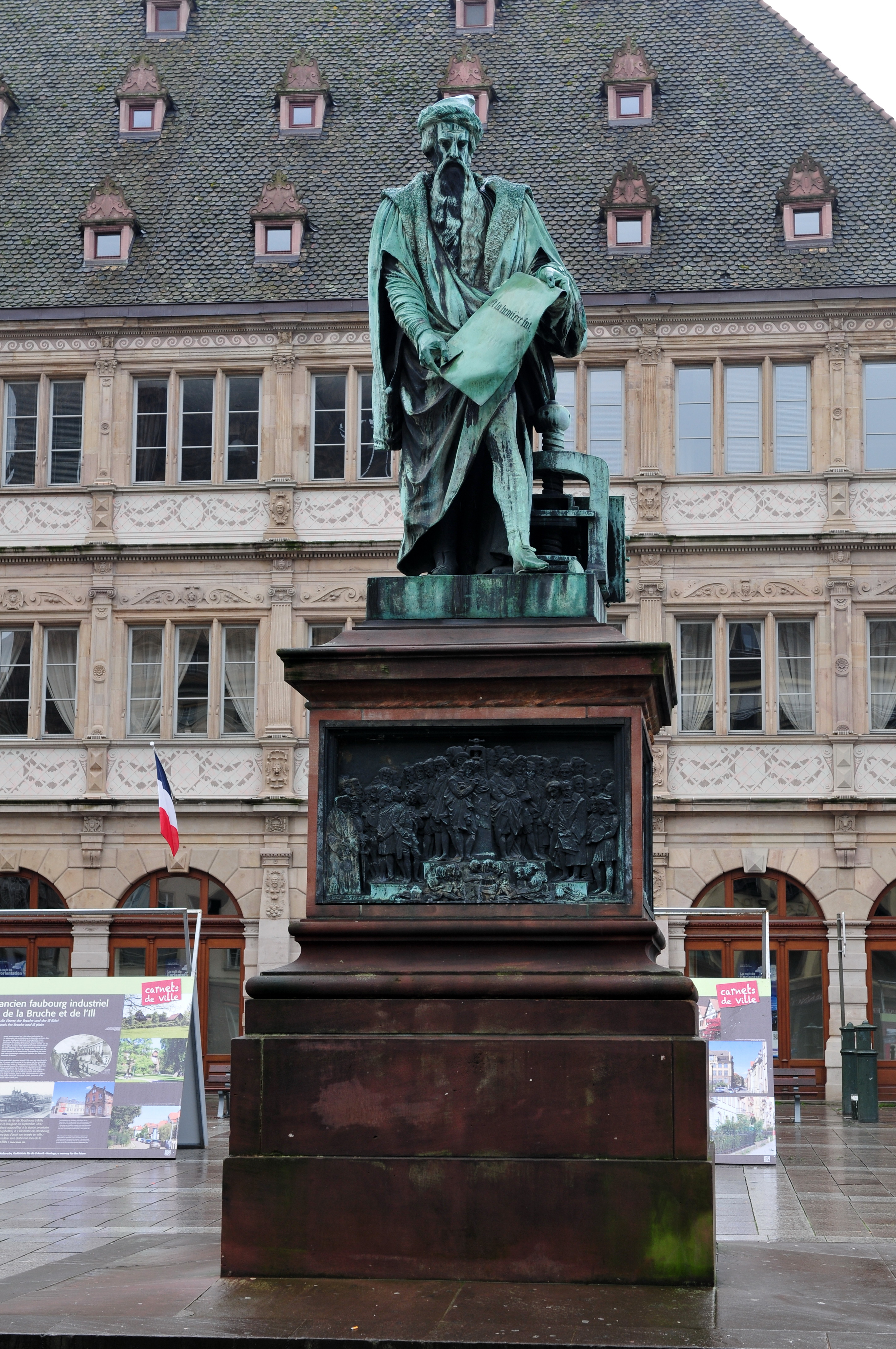 Straßburg European Parliament 2014 3.–7. February 2014, StrasbourgThis photo has been created within the project "WIKI loves parliaments / European Parliament". Usage and Help If you have any questions concerning this picture or how to use it, feel free to